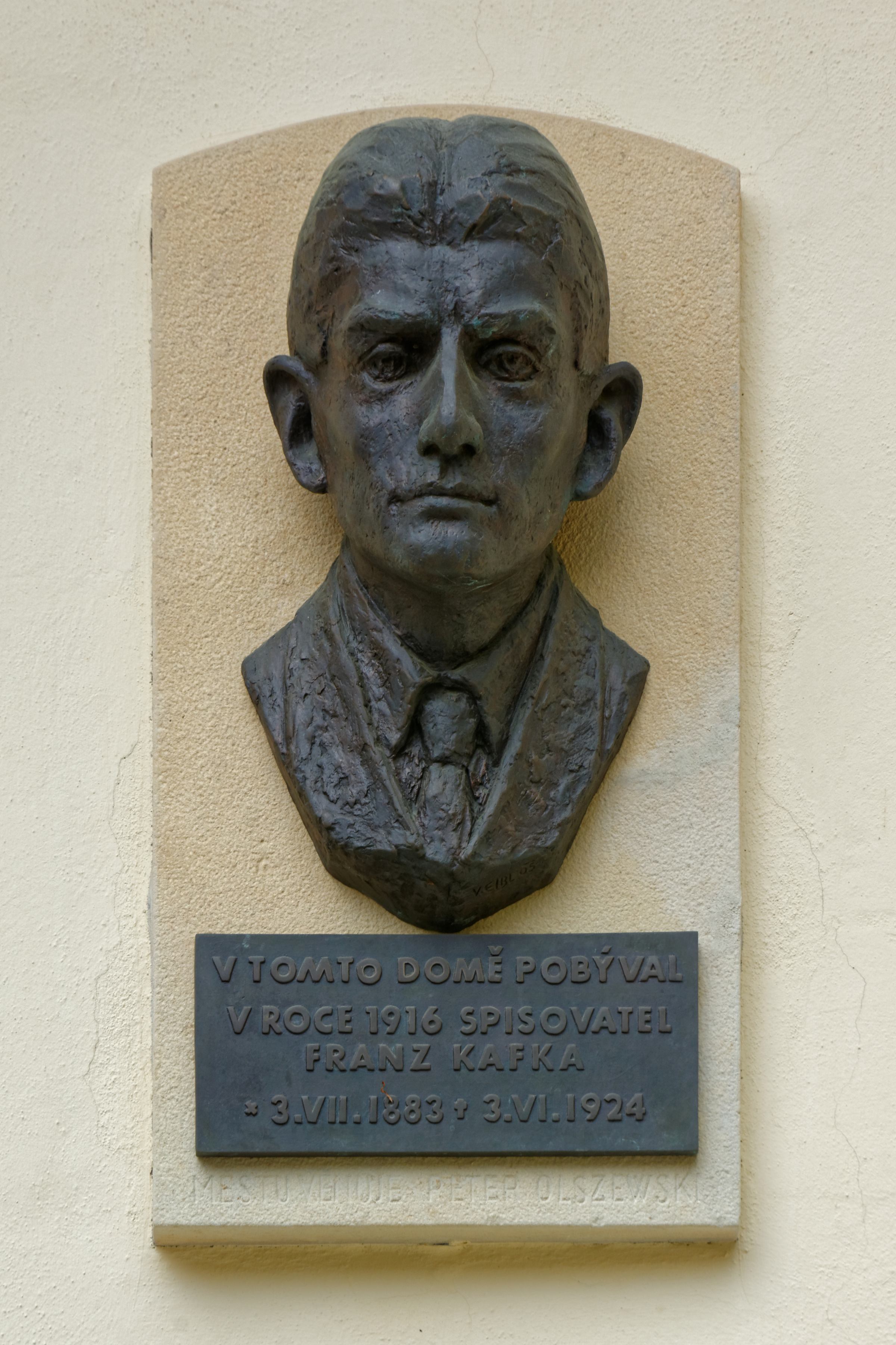 Mariánské Lázně, Lázeňský dům Balmoral - Osborne, Hlavní třída 389/14,390/14A, pamětní deska Franze Kafky. Text: V tomto domě pobýval v roce 1916 spisovatel Franz Kafka *3.VII.1883 +3.VI.1924 Městu věnuje Peter Olszewski